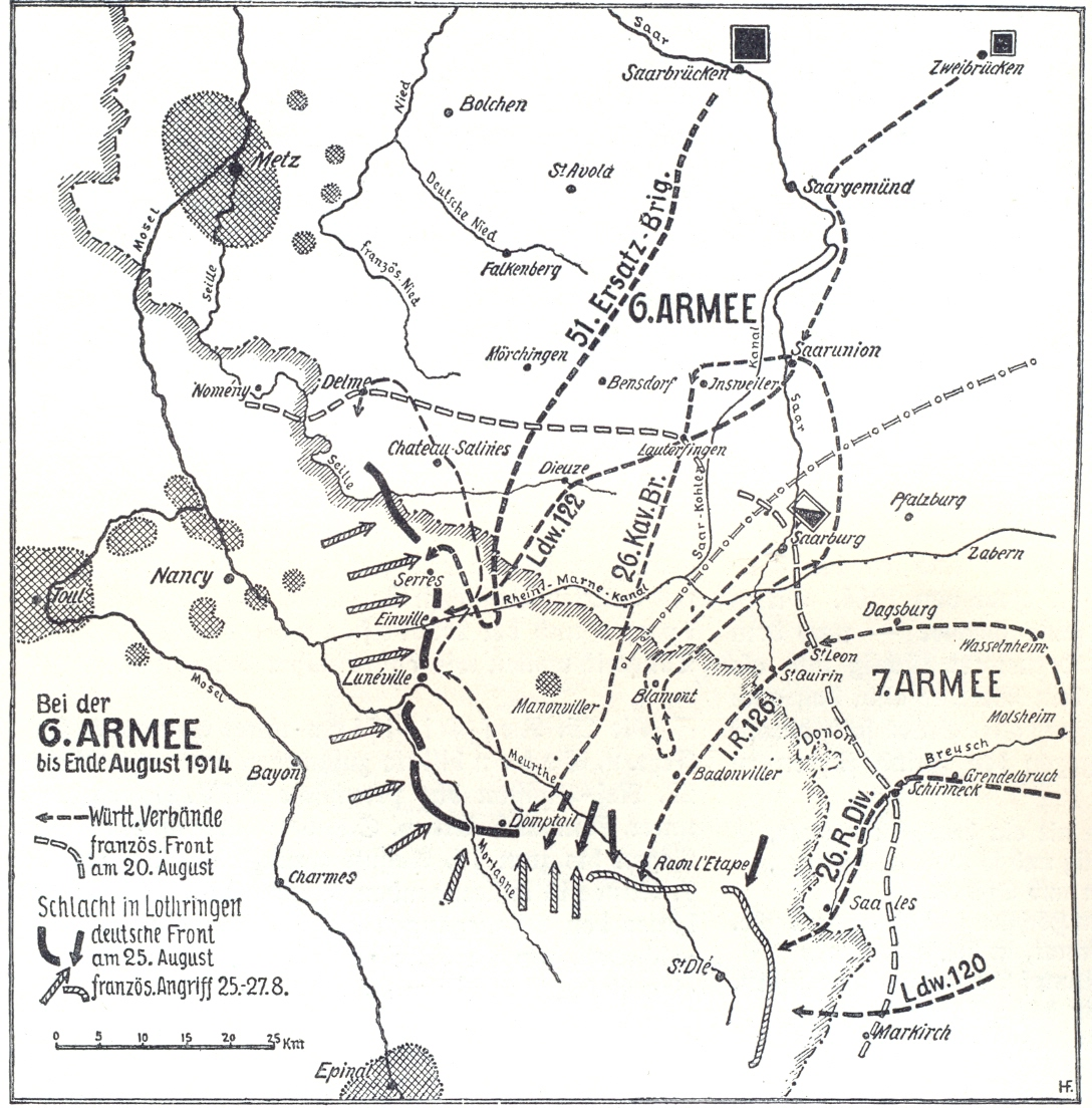 Karte Seite 18: 6. Armee August 1914